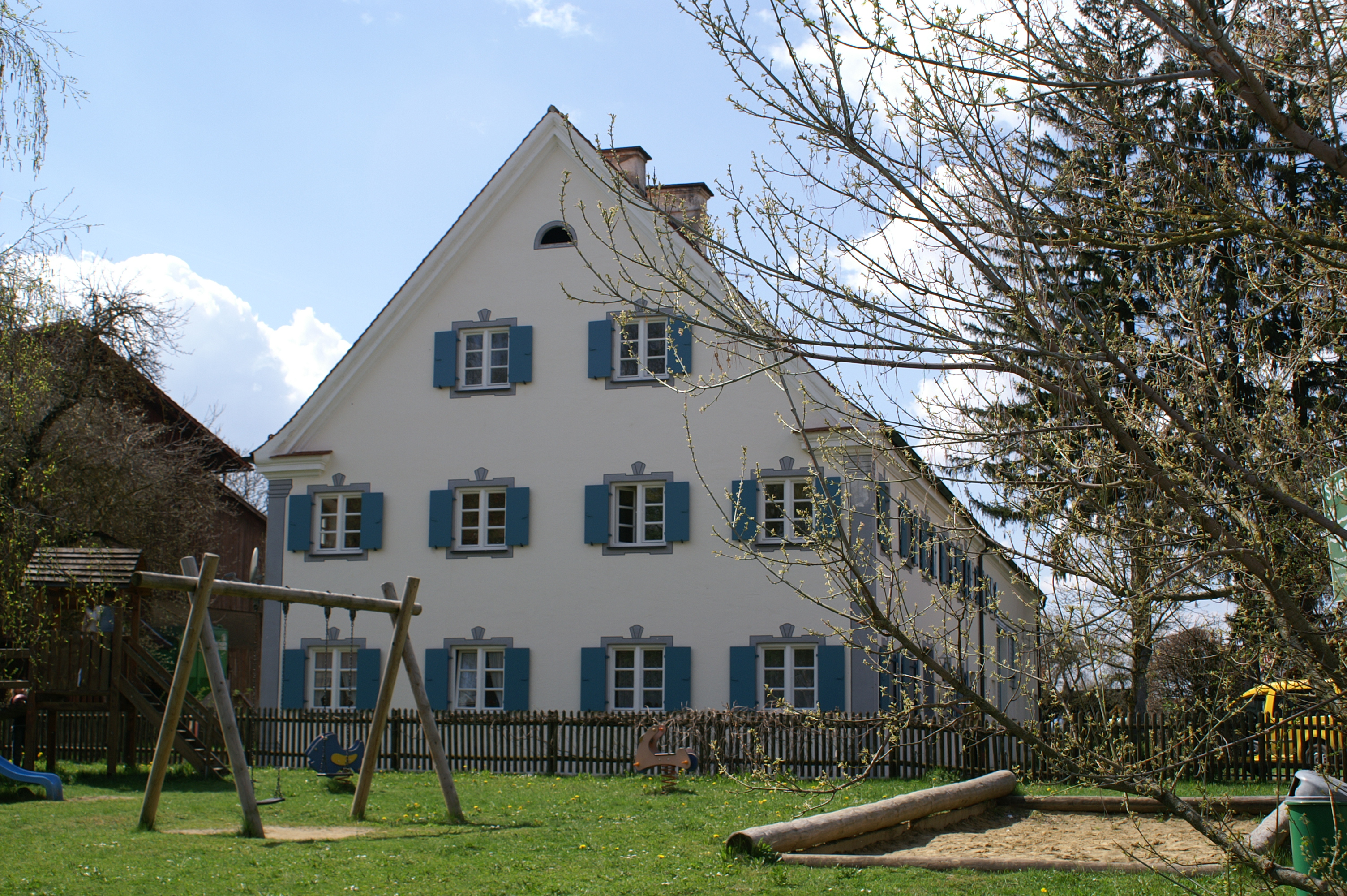 Ehem. Pfarrhaus in Stockheim, Bad Wörishofen